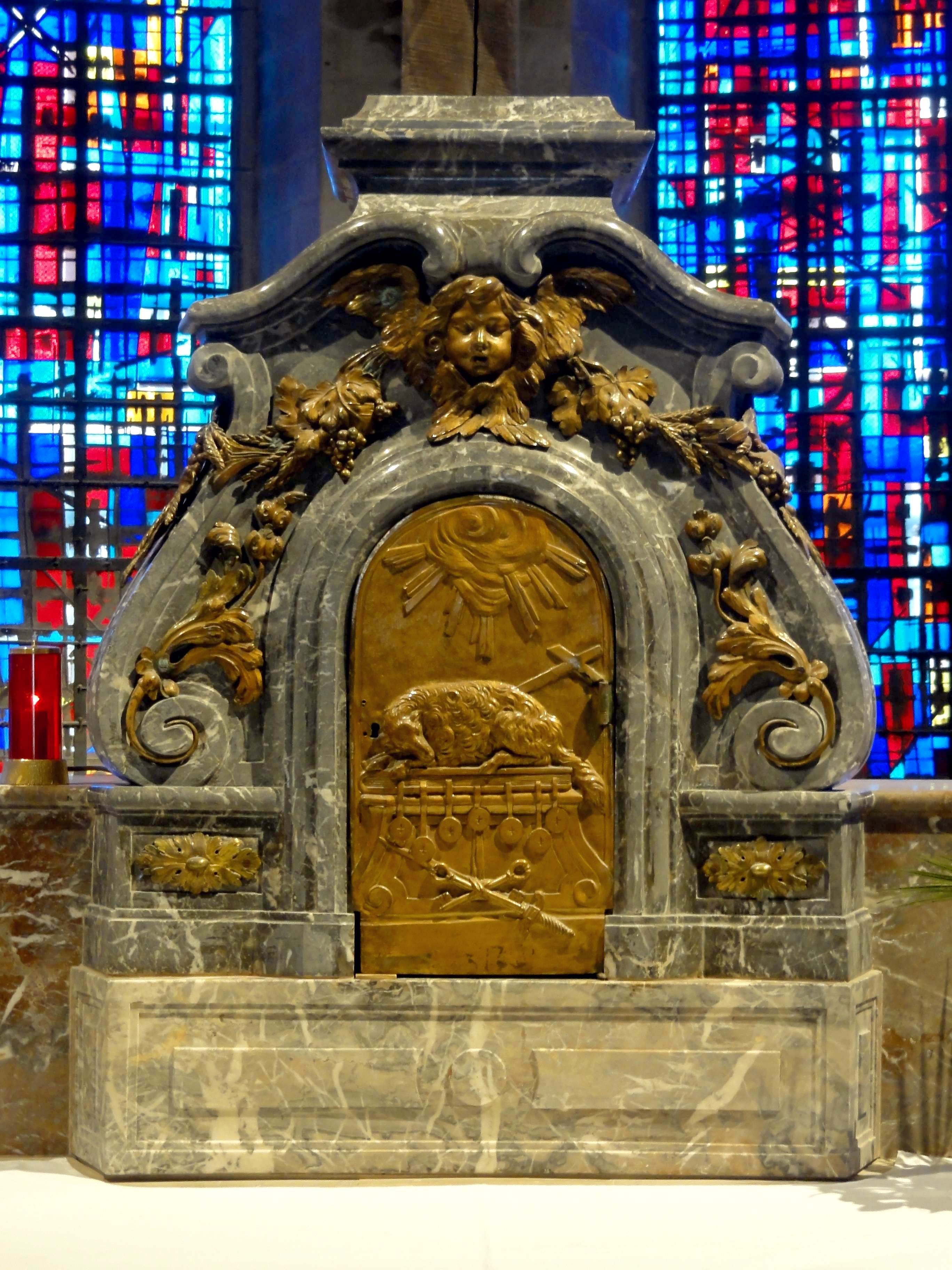 Mobilier de l'église - voir titre.